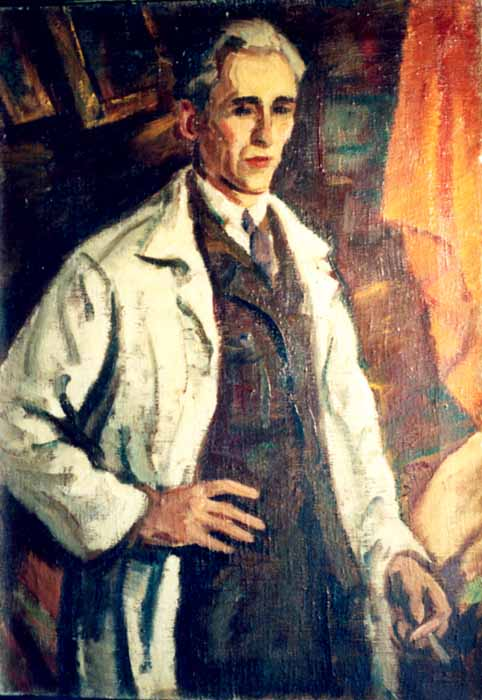 Ştefan Dimitrescu - Autoportret, 70,4x49,7 cm, Muzeul Municipiului Bucureşti